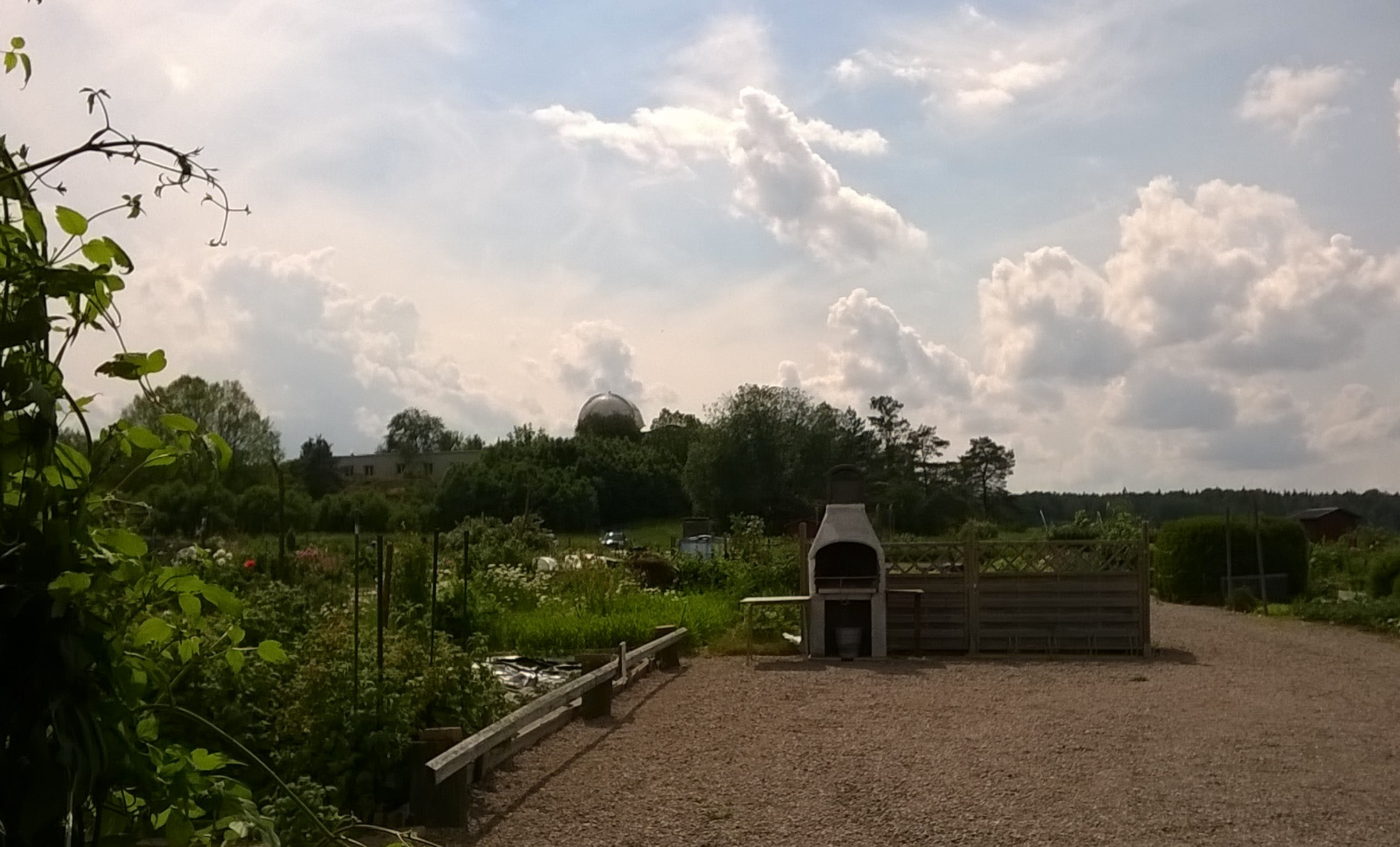 Hällbyvallen i Uppsala med observatoriekullen i bakgrunden